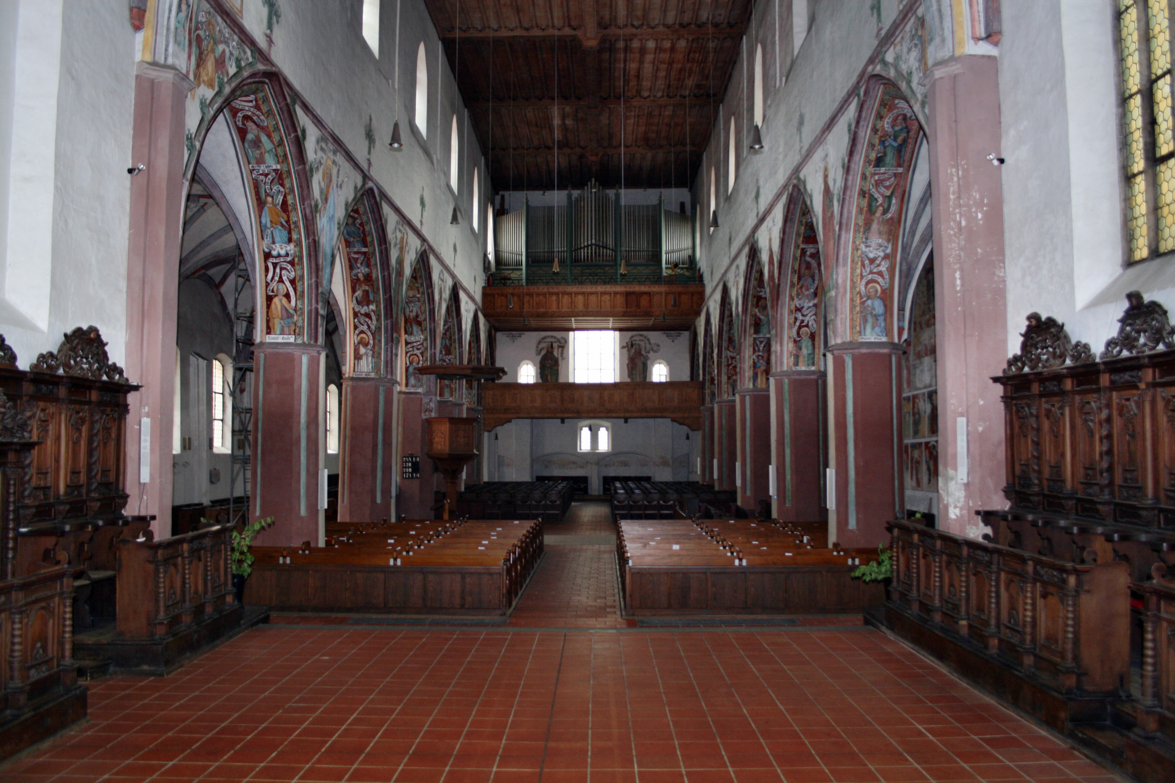 Unser Frauen (Memmingen), das Kirchenschiff vom Chor aus mit den zwei Emporen